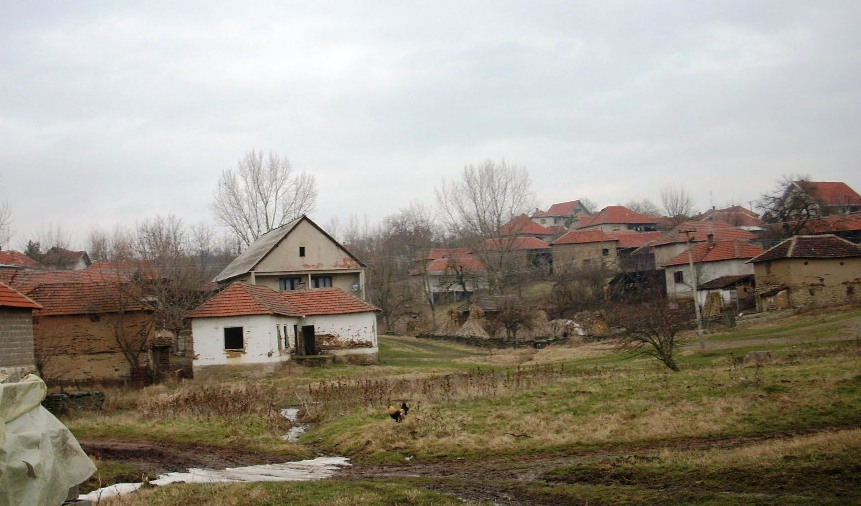 Granica, Bojnik